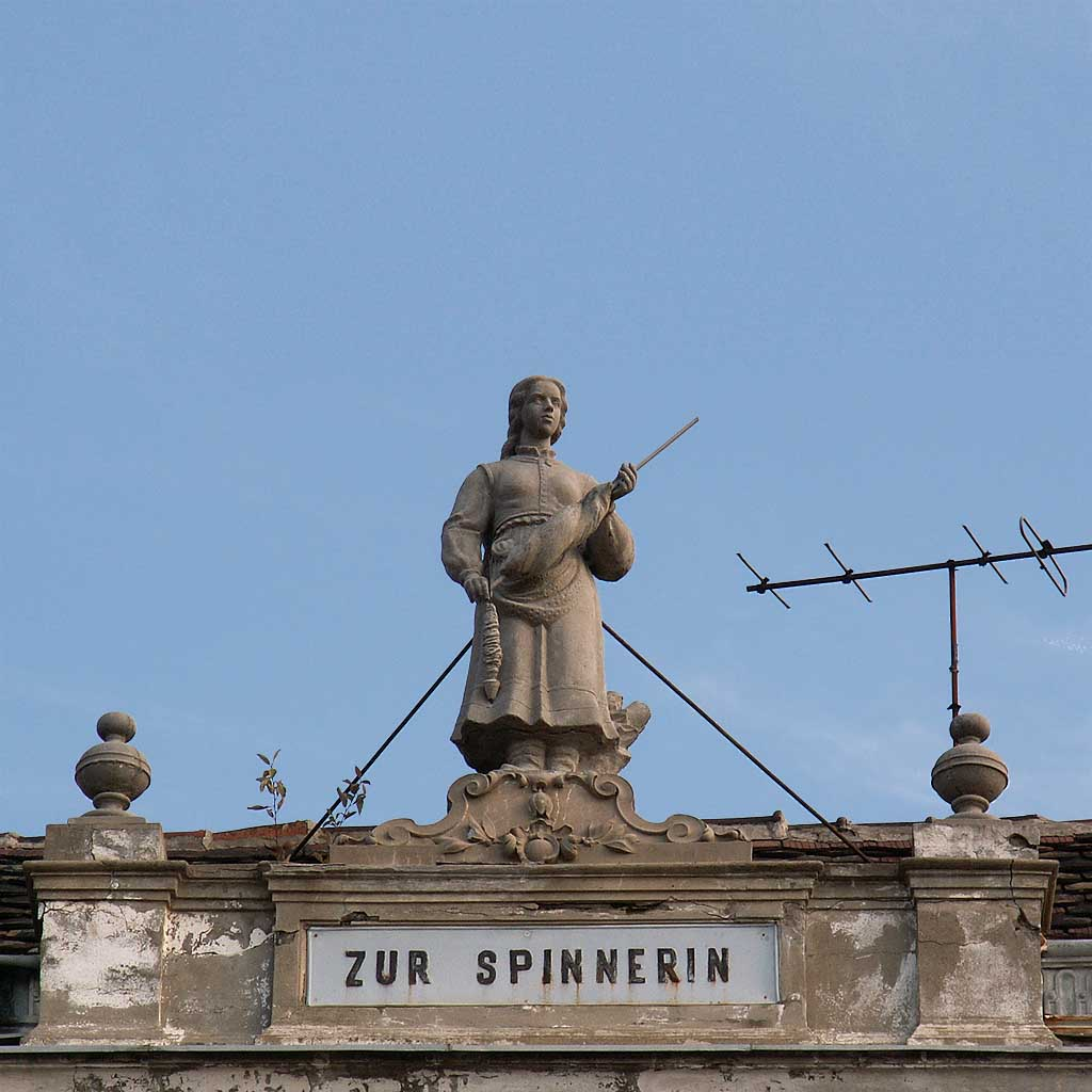 medias